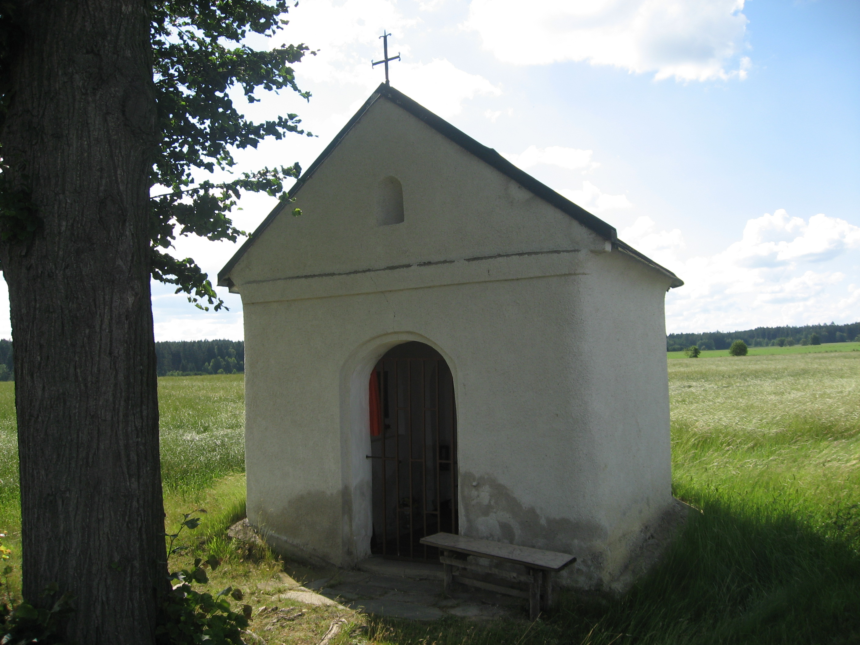 Kaplička poblíž Dobronína